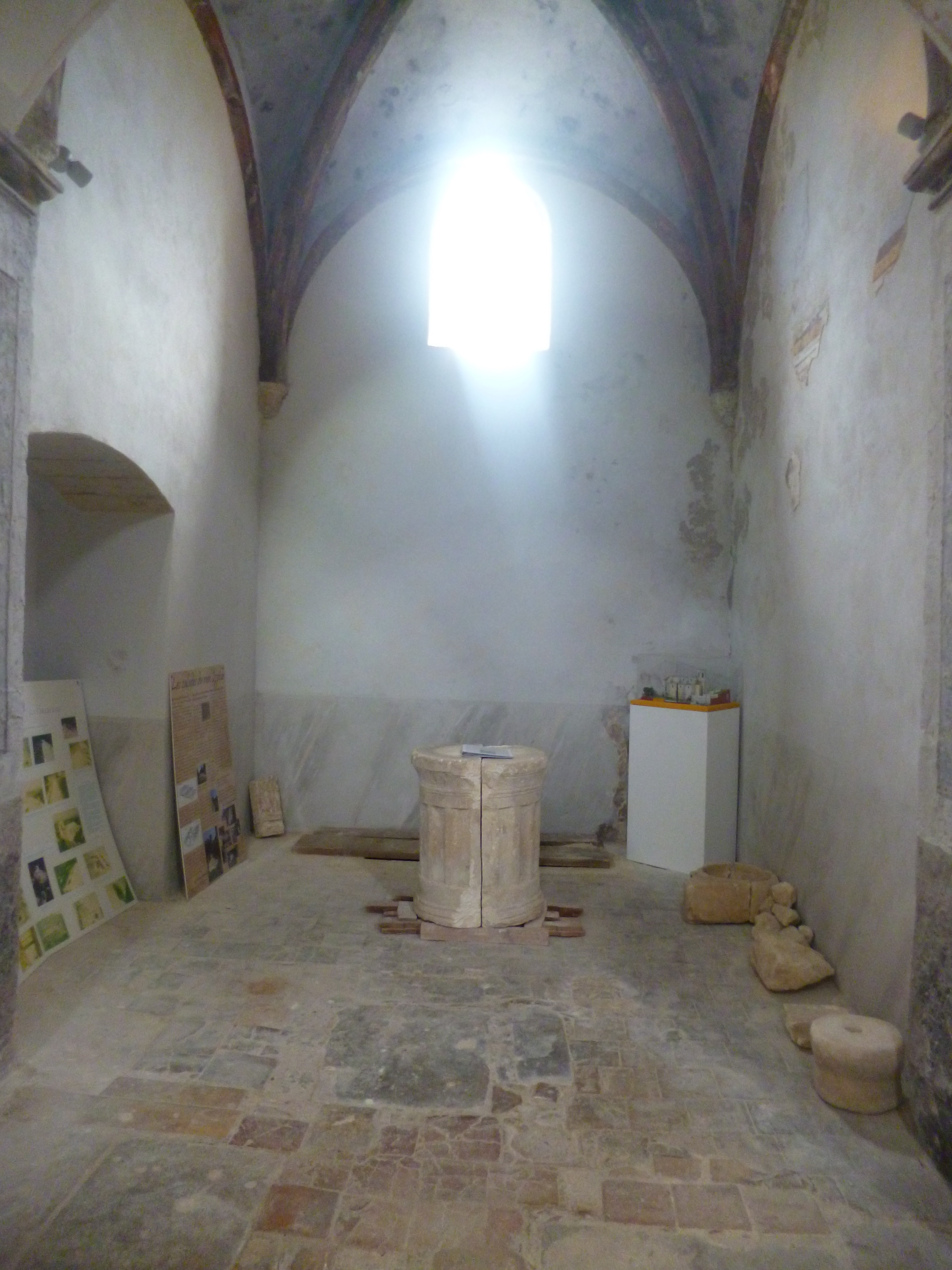 La colonne romaine avec inscriptions médiévales dans la chapelle nord du bâtiment qui est devenue d'ailleurs une sorte de mini-musée archéologique puisqu'on peut y voir aussi les résultats des fouilles de 2003.